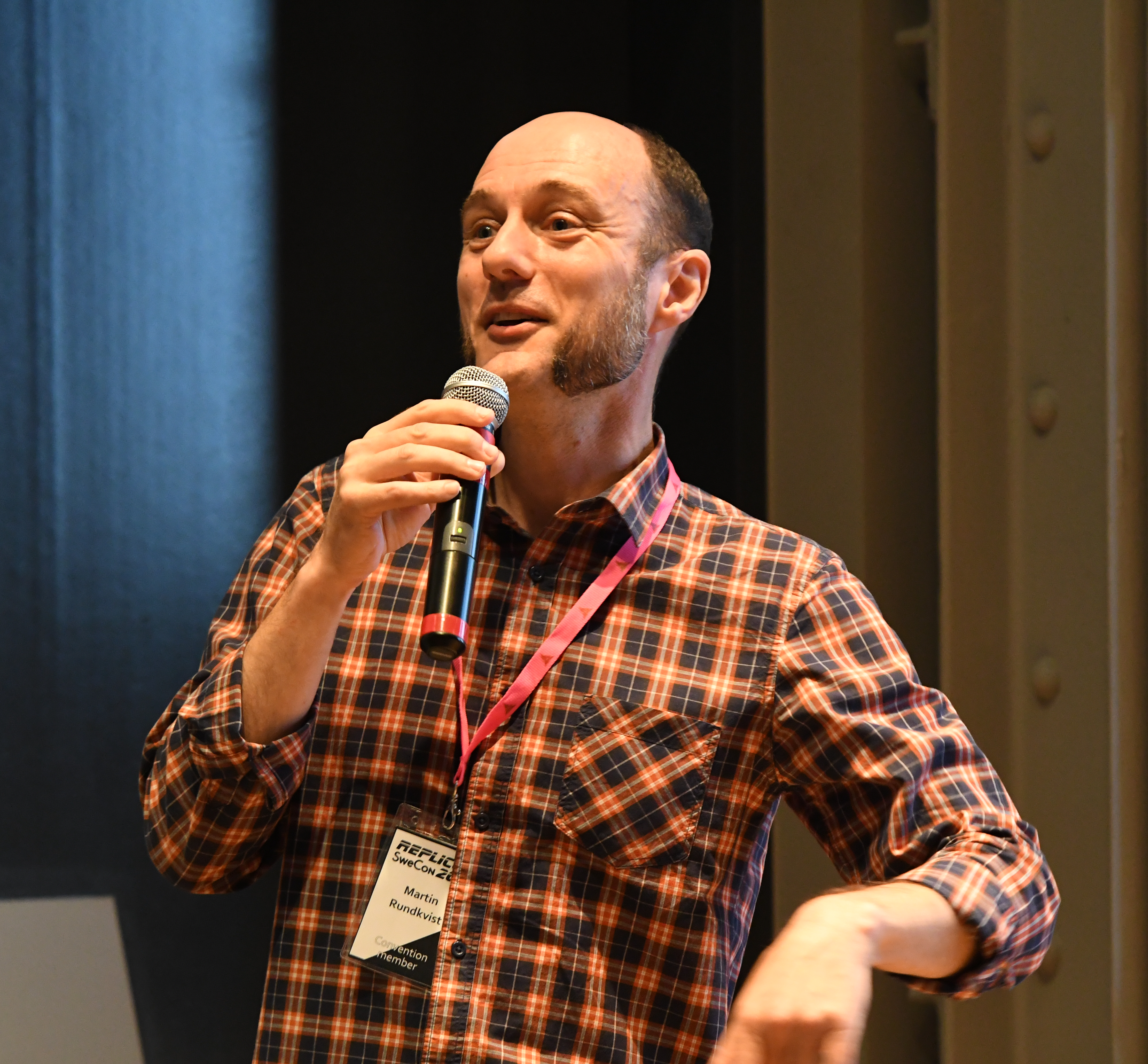 Swecon 2019 (Replicon) i Västerås. Martin Rundkvist föreläser.